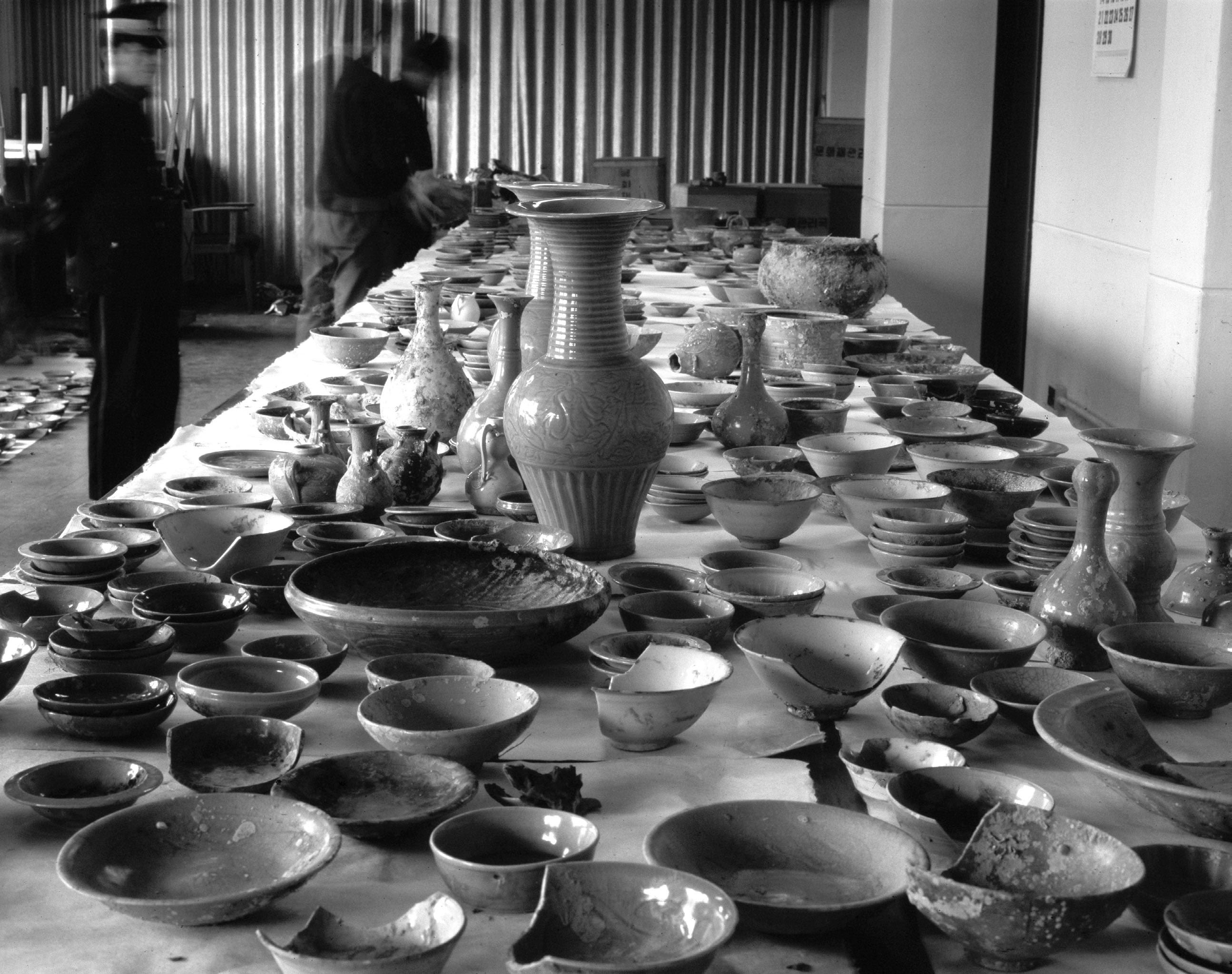 촬영일 : 1976년 11월 15일 촬영장소 : 대한민국 신안 앞바다 참석자 : 없음 관련내용 : 신안 앞바다에서 인양한 중국 송-원대 도자기